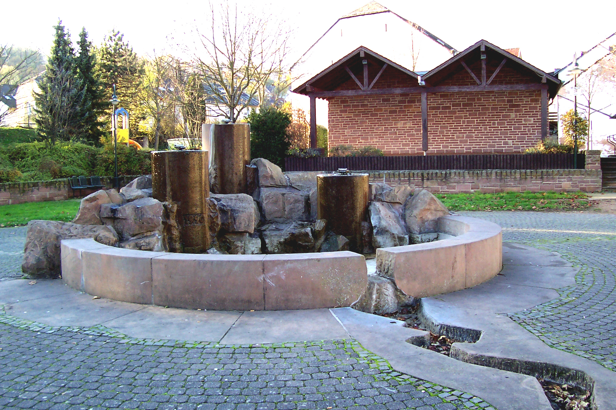 Brunnen am Marktplatz in Wasserliesch